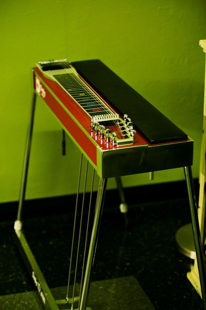 Derby Steel's Pedal Steel Guitar